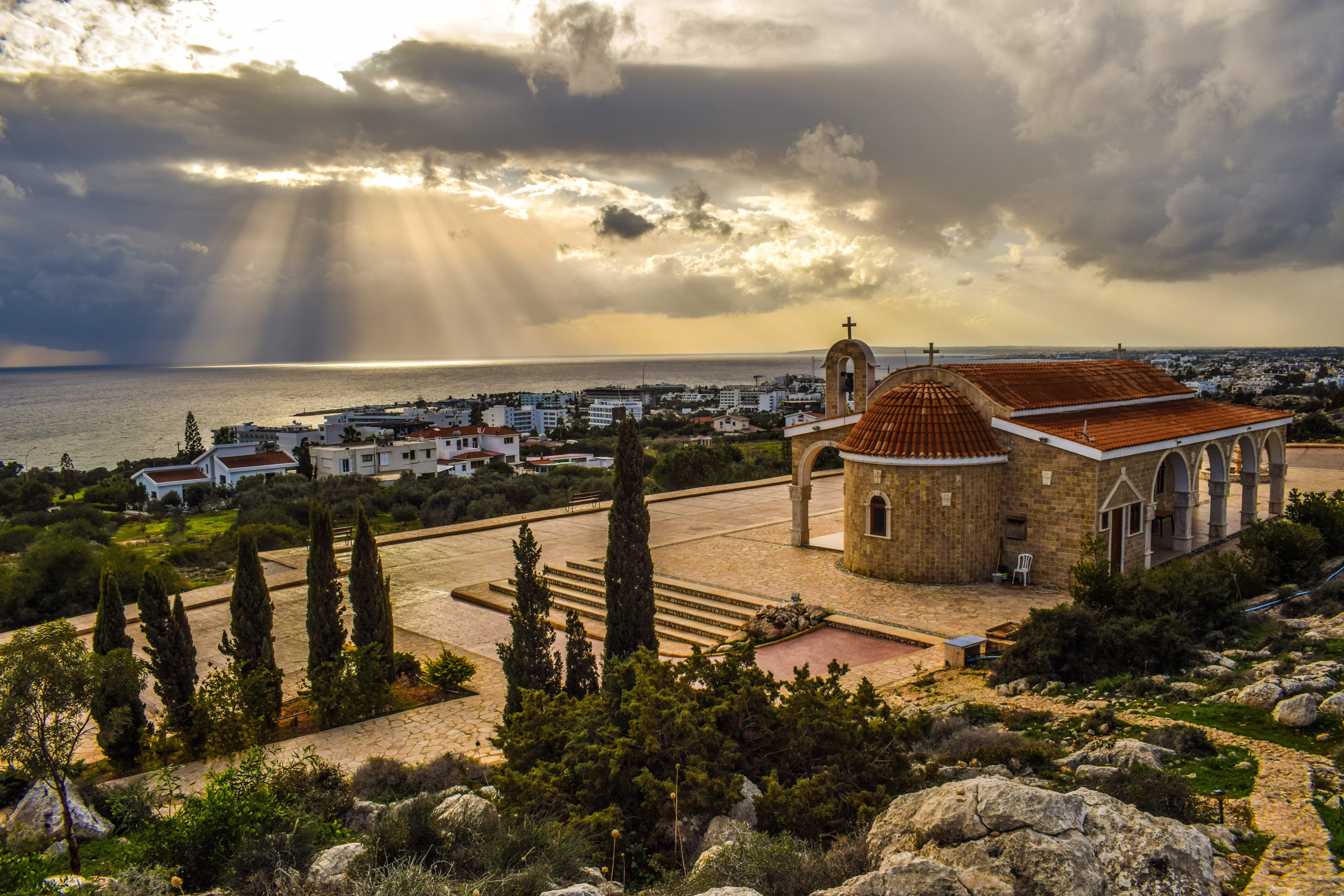 Agios Epiphanios Chapel, Ayia Napa, Cyprus